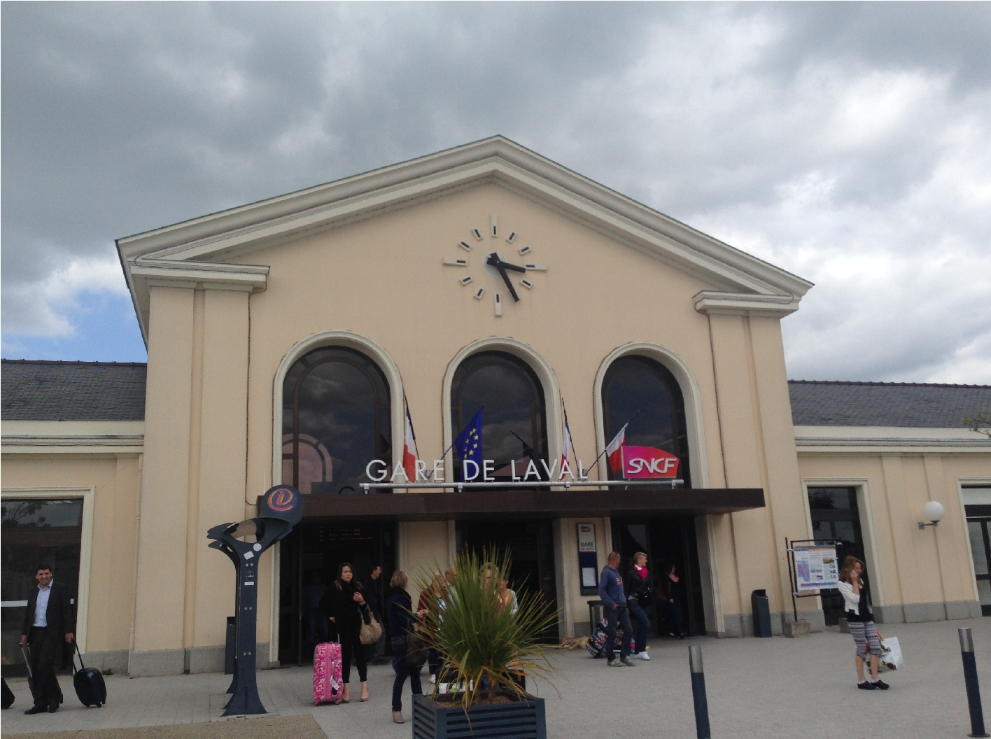 Gare de Laval-2015